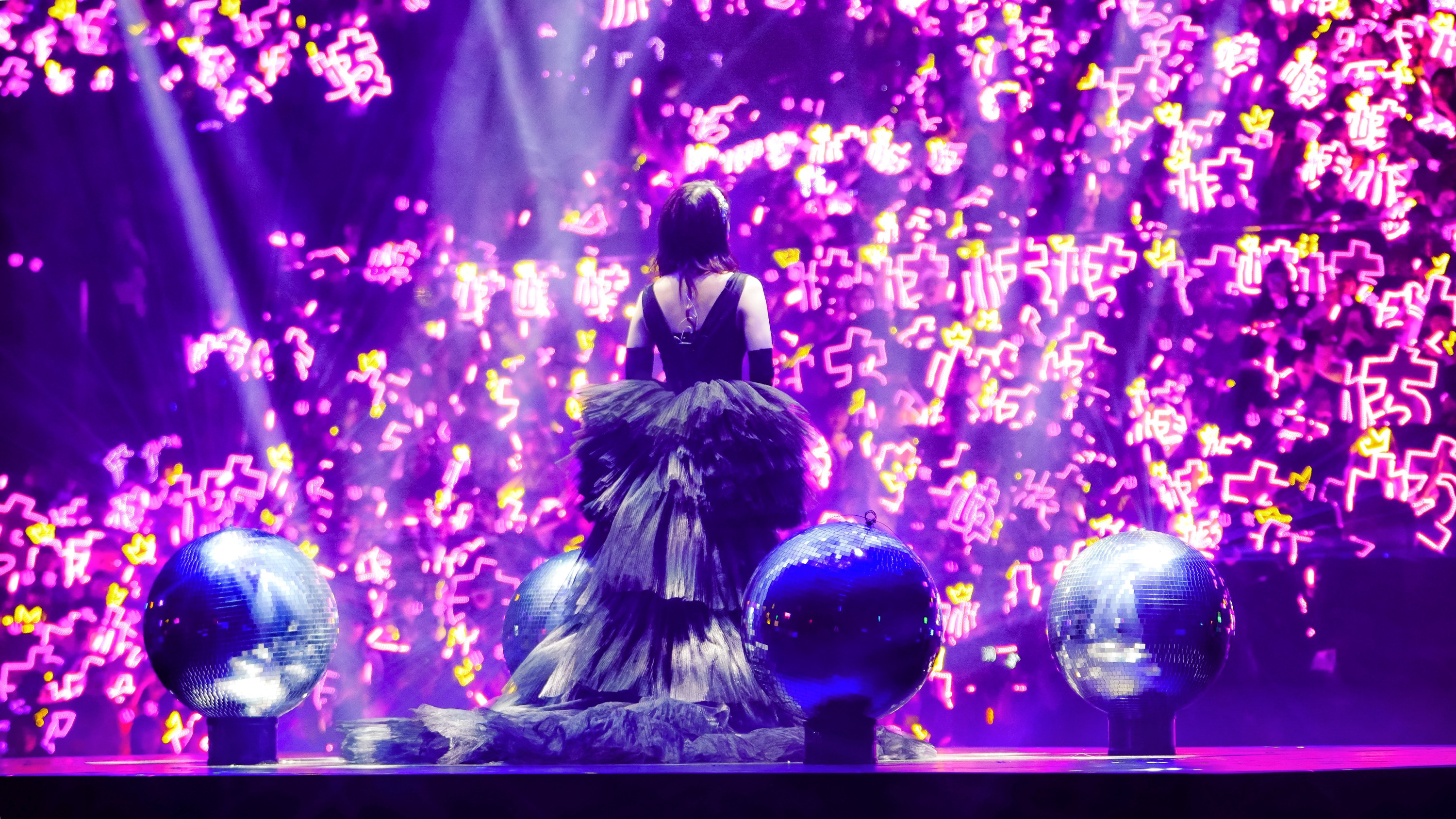 中文（中国大陆）: 2019年2月23日北京凯迪拉克中心，孟美岐在“2019火箭少女101飞行演唱会 LIGHT·北京站”表演时的照片。